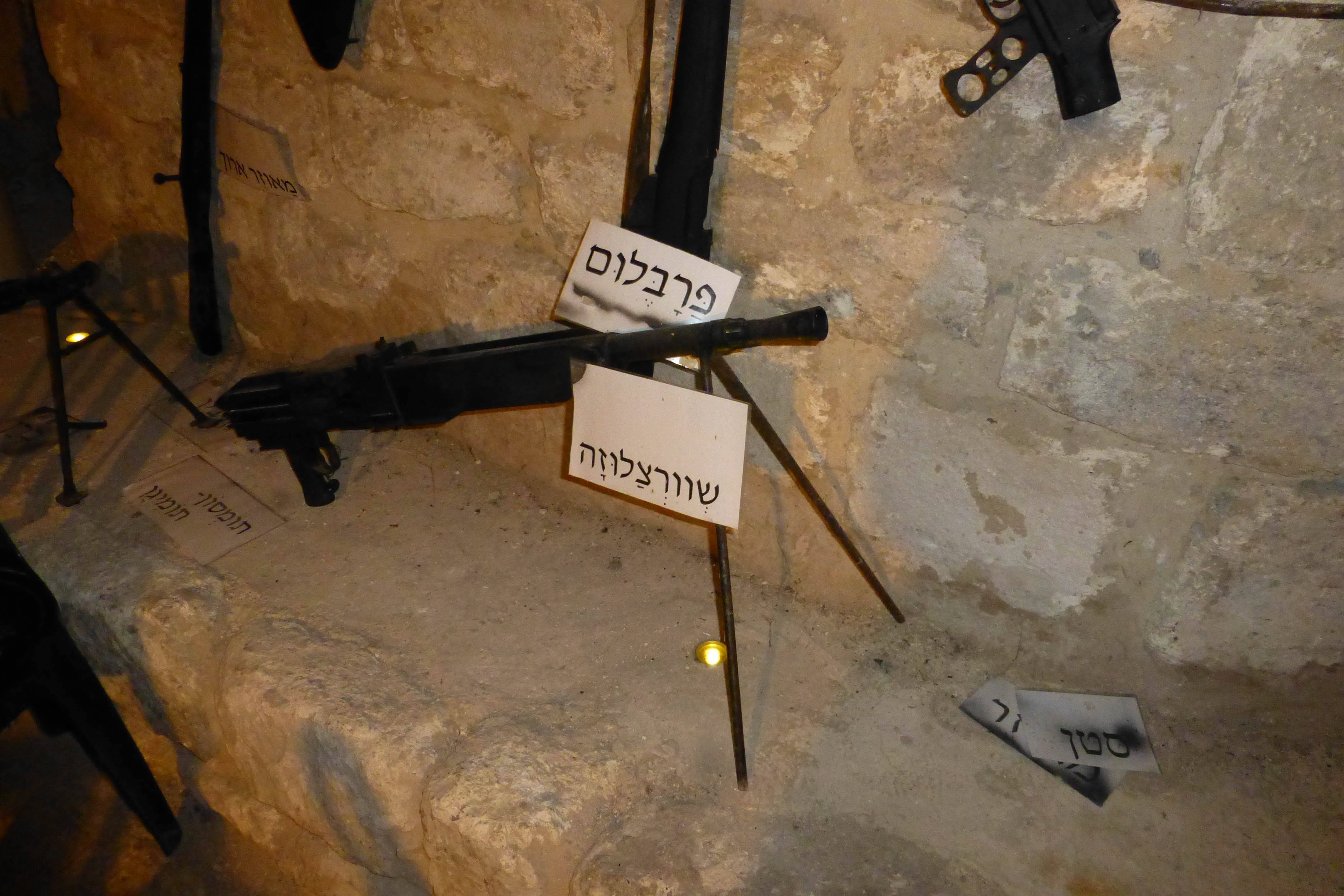 מערת הפלמ"ח במשמר העמק